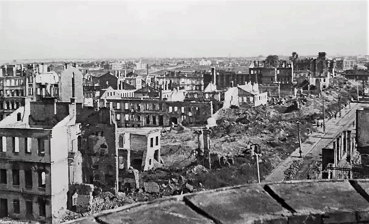 Освобождённый Минск